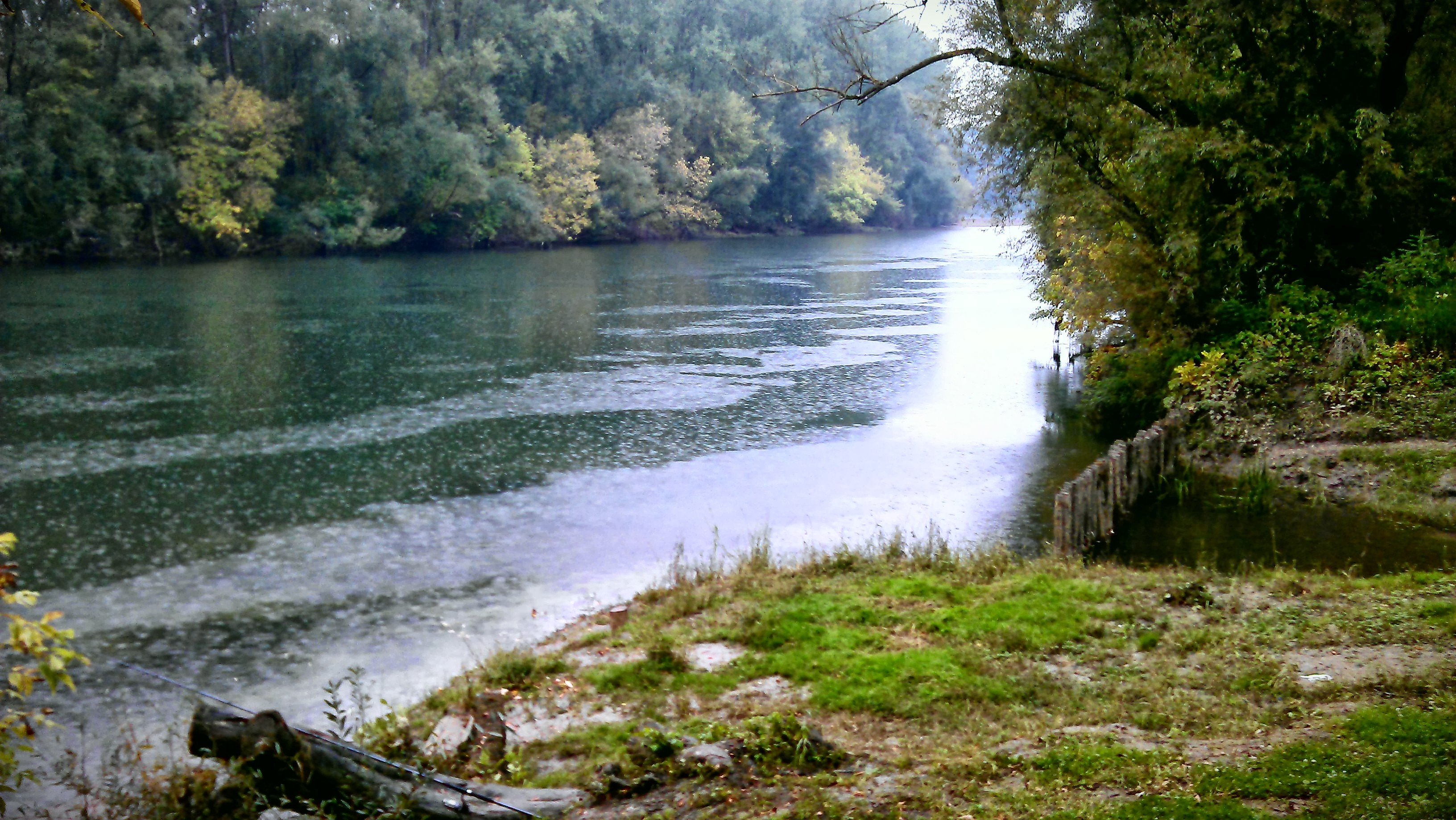 Kupa